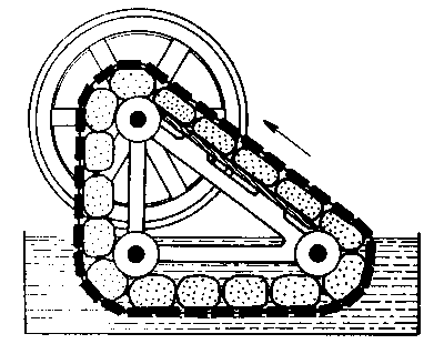 古人发明的永动机